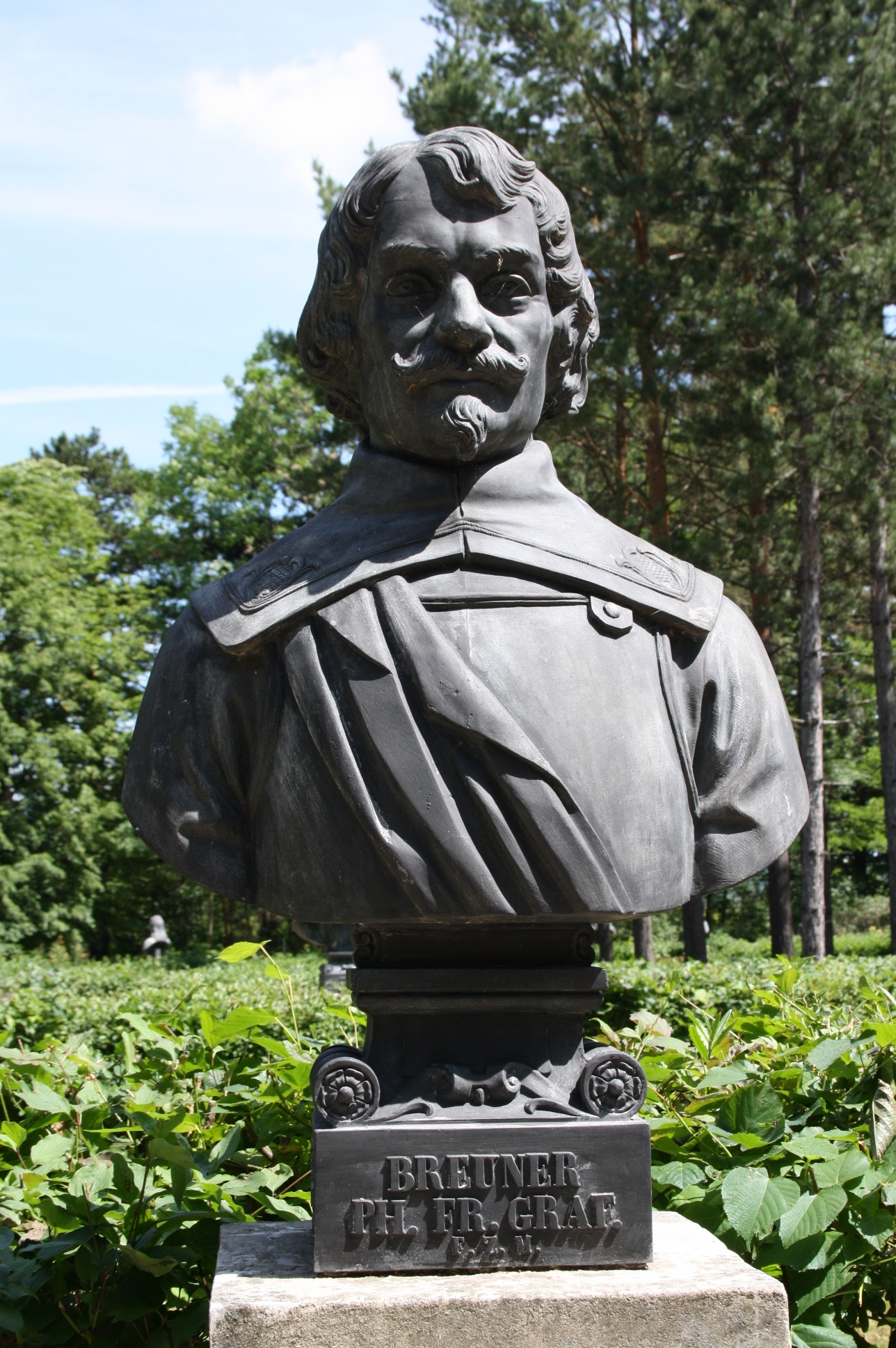 Büste in der Gedenkstätte Heldenberg (Niederösterreich)